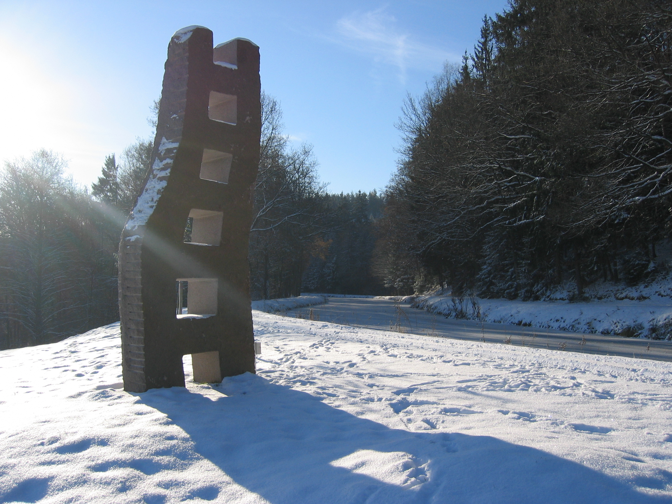 Winter at old "Ludwigkanal" in Berg bei Neumarkt i.d. OPf., Bavaria, Germany with Granite Sculptur "Himmelsleiter" from Huber Maier